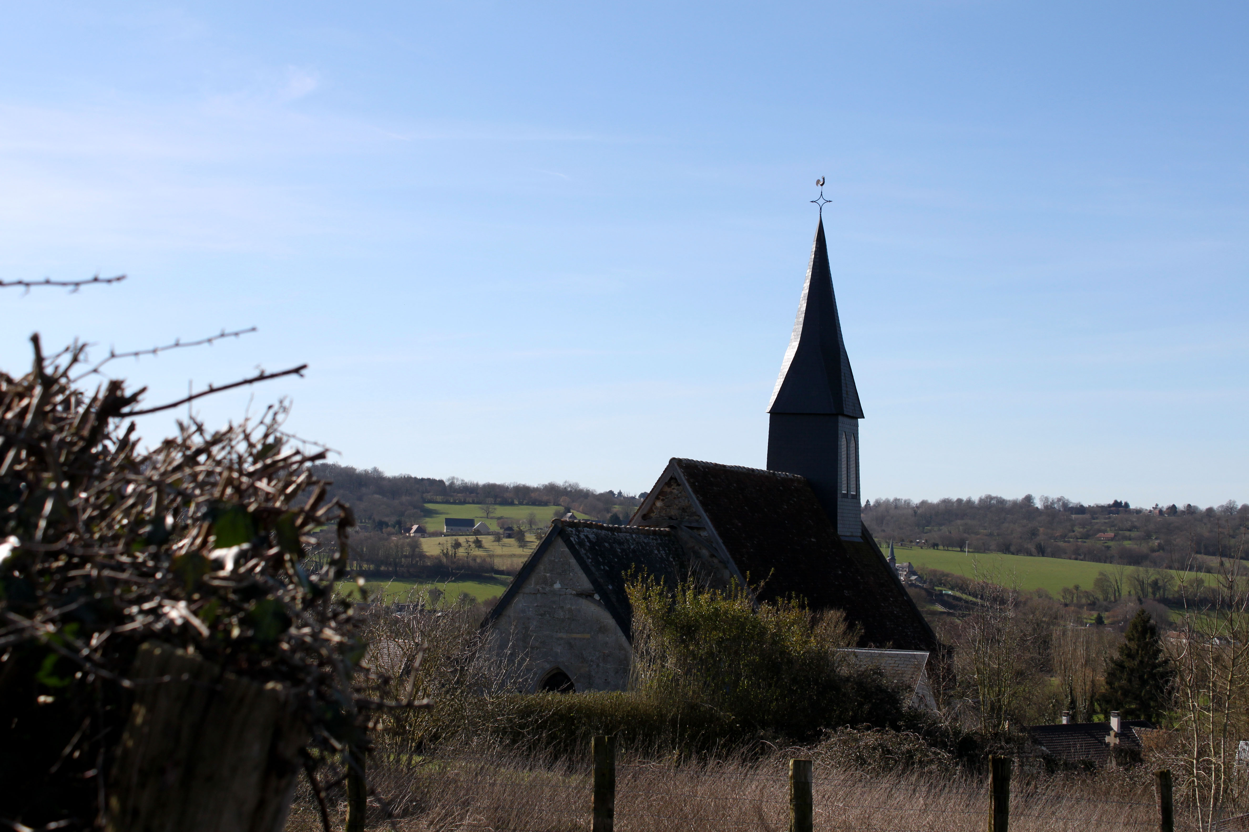 Vue panoramique de l'église de Saint-Denis-de-Mailloc